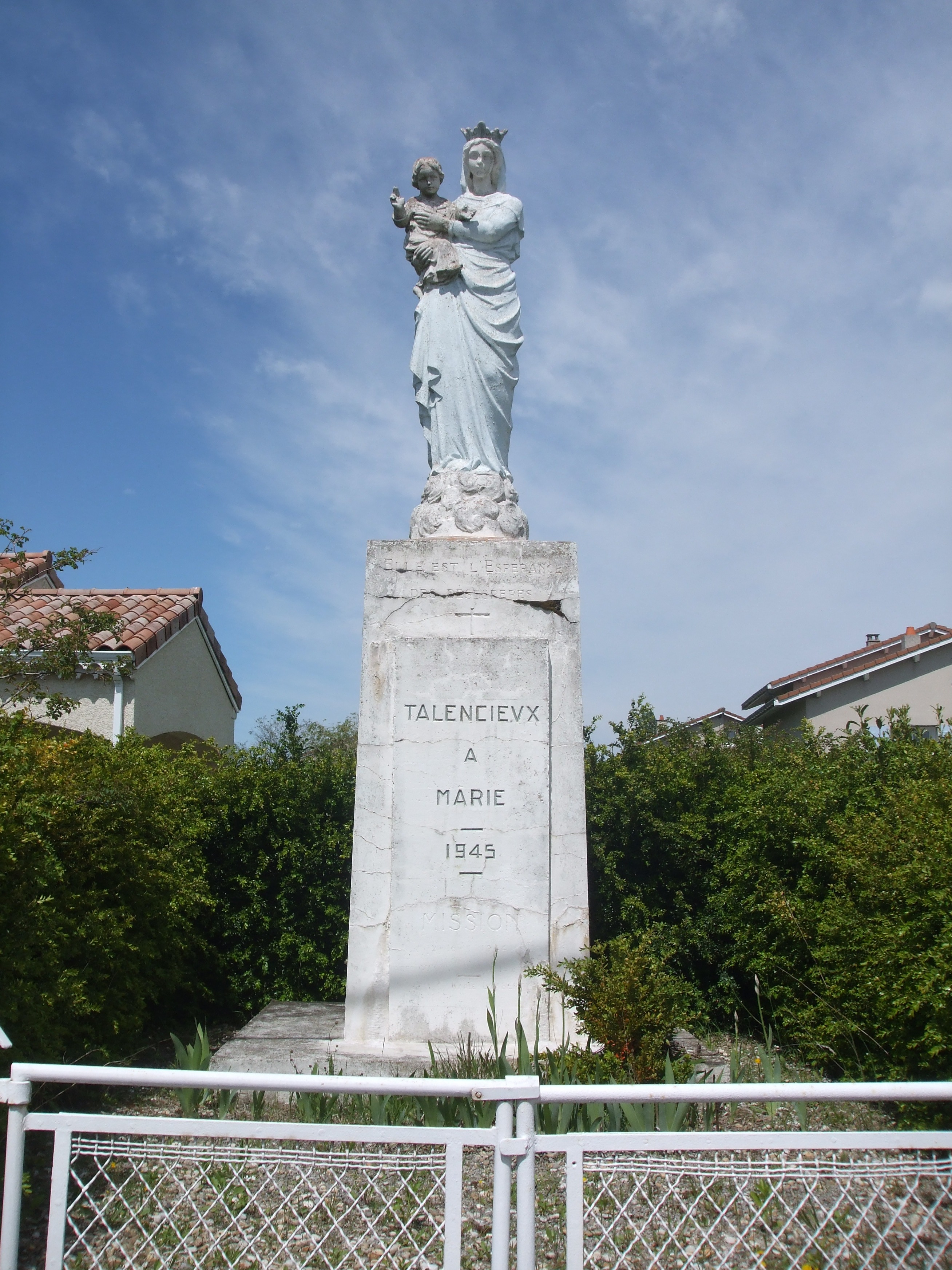 Statue élevée en 1945 en reconnaissance à la Vierge - Talencieux (Ardèche)